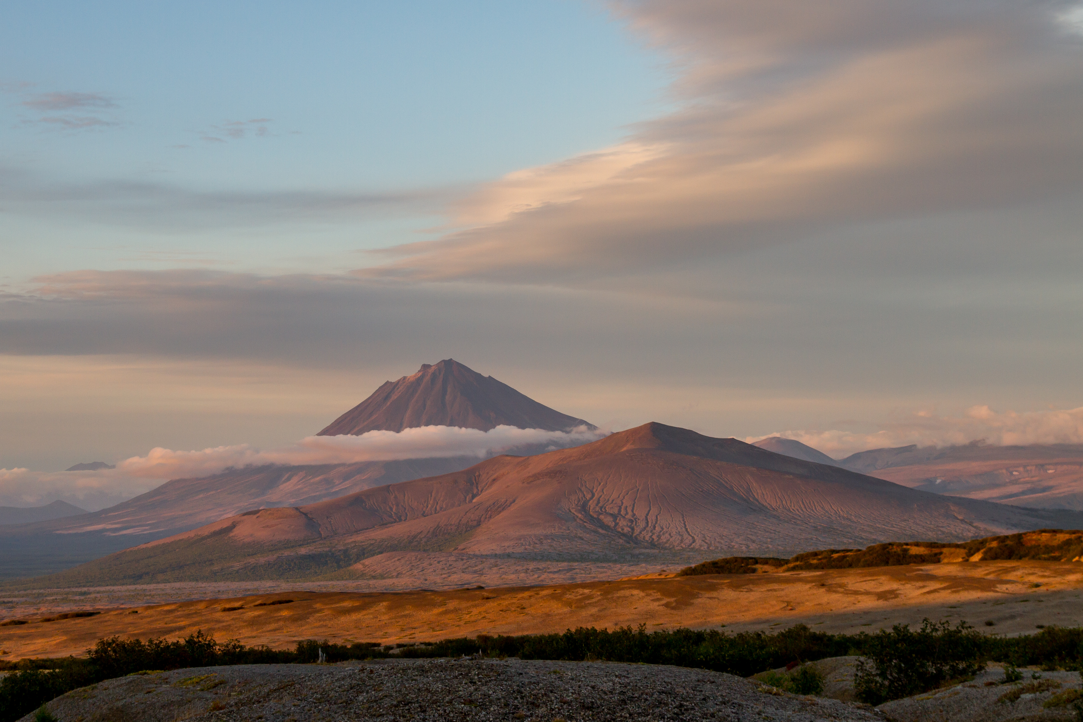 Кальдера вулкана Ксудач: Находится на территории природного парка "Южно-Камчатский" и представляет собой кальдеру вулкана Ксудач, заполненную кратерными озерами. Наиболее значимые из которых, это озера Ключевое и Штюбеля, Елизовский район, Камчатский край This image is related to the protected area of Russia number 4110028